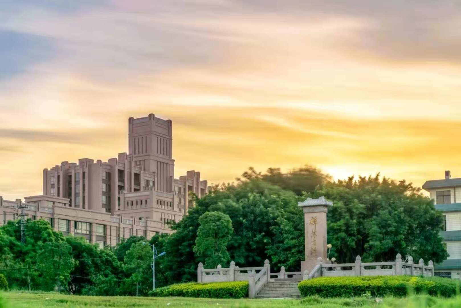 2017年修缮前